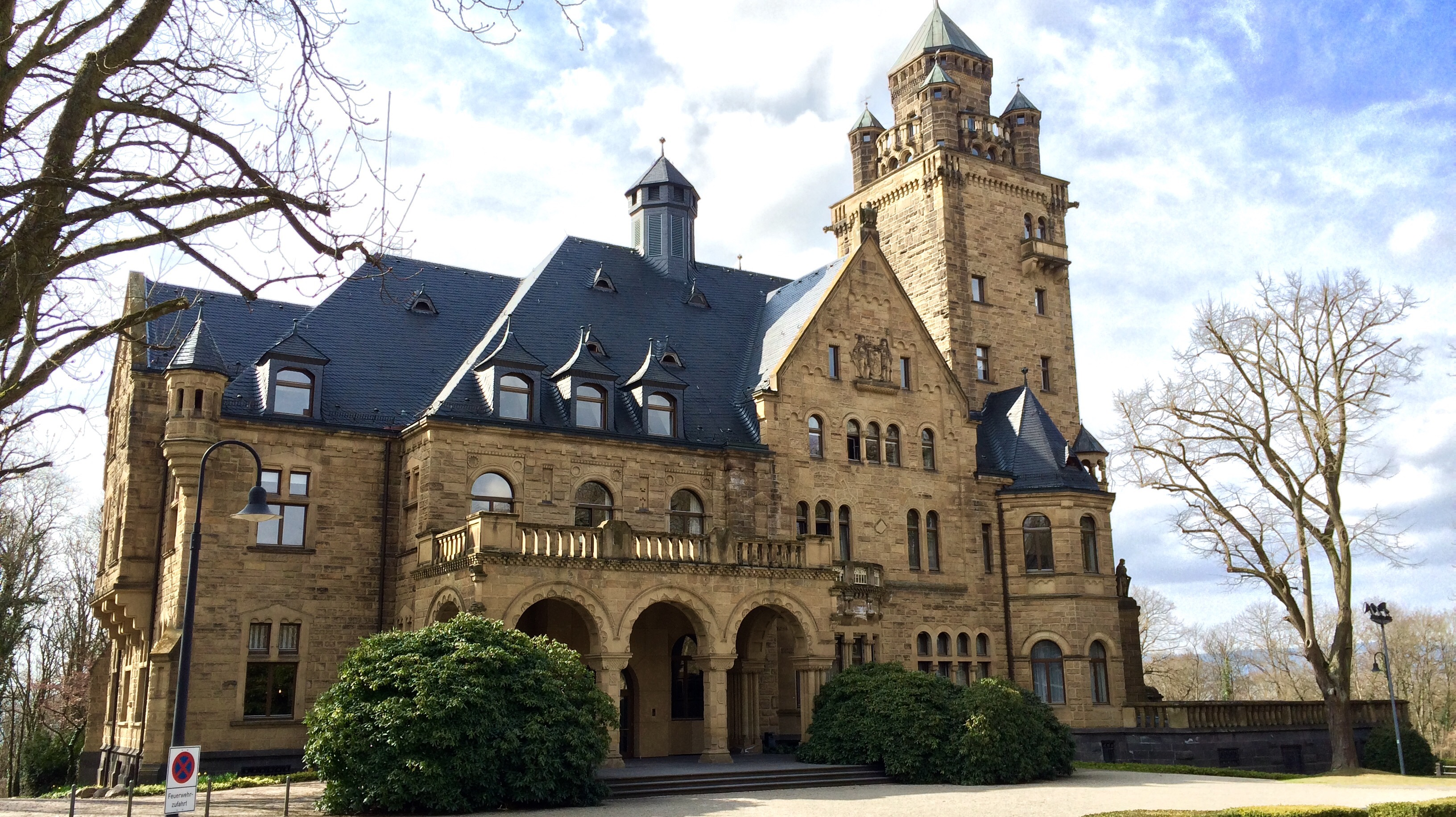 Schloss Waldthausen, Mainz, Frontansicht